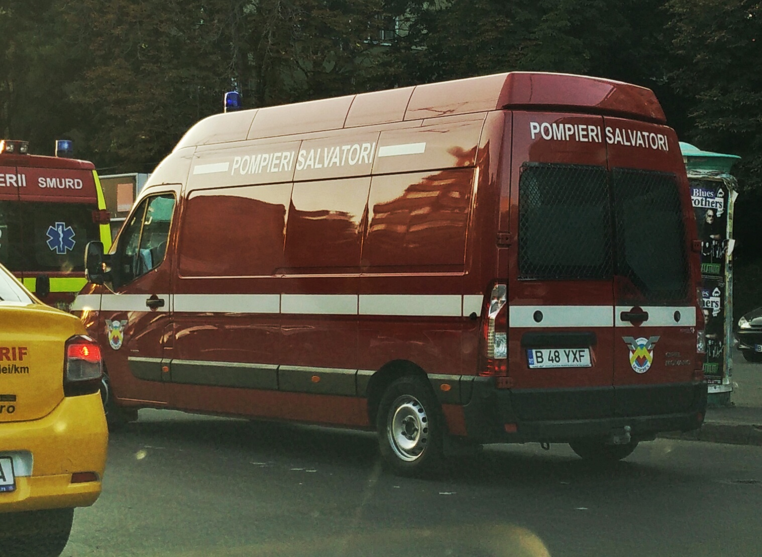 Autospecială salvatori Metrorex, în fața stației Gorjului